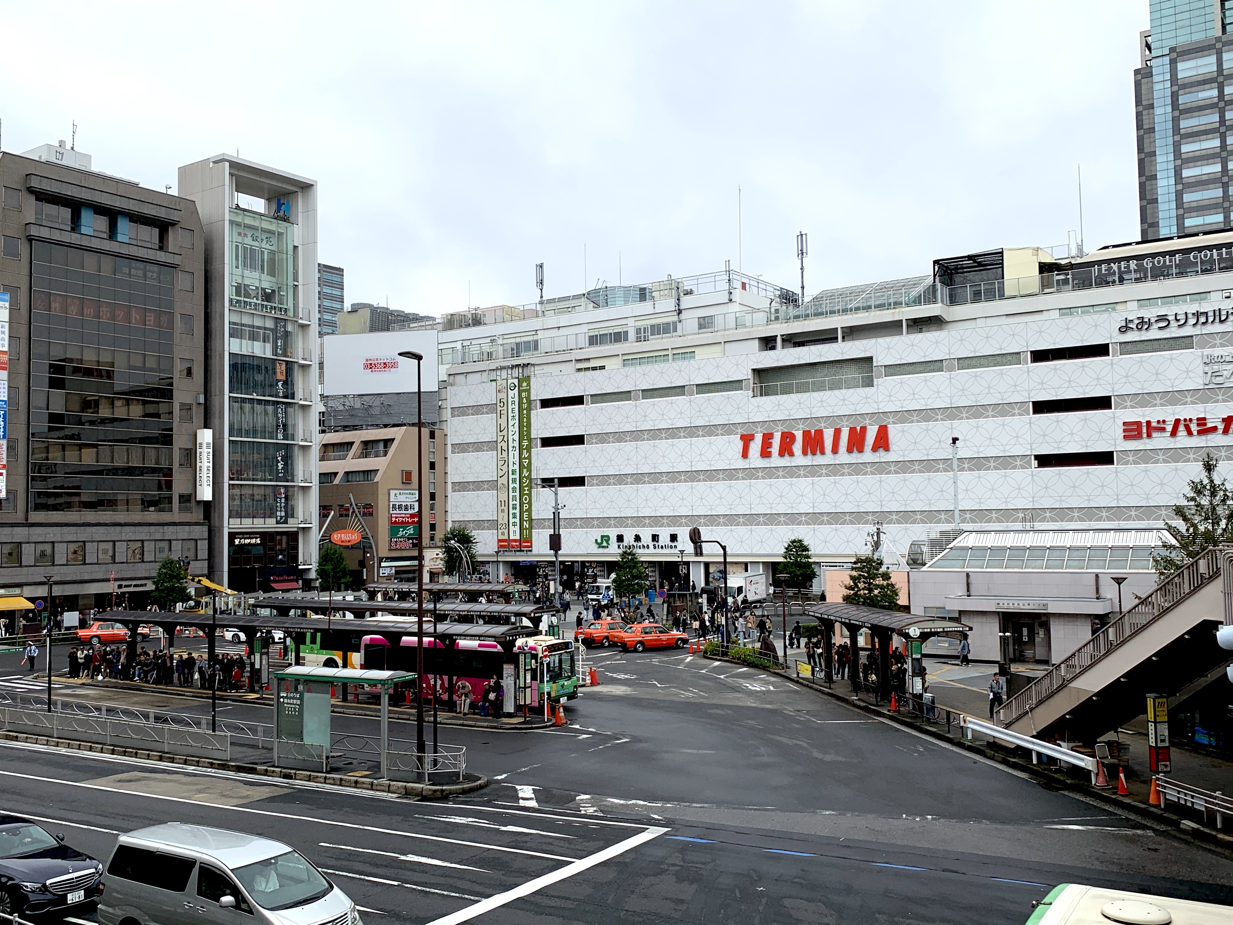 錦糸町駅前交差点歩道橋から、バスターミナルとJR東日本錦糸町駅南口(TERMINA)を望む